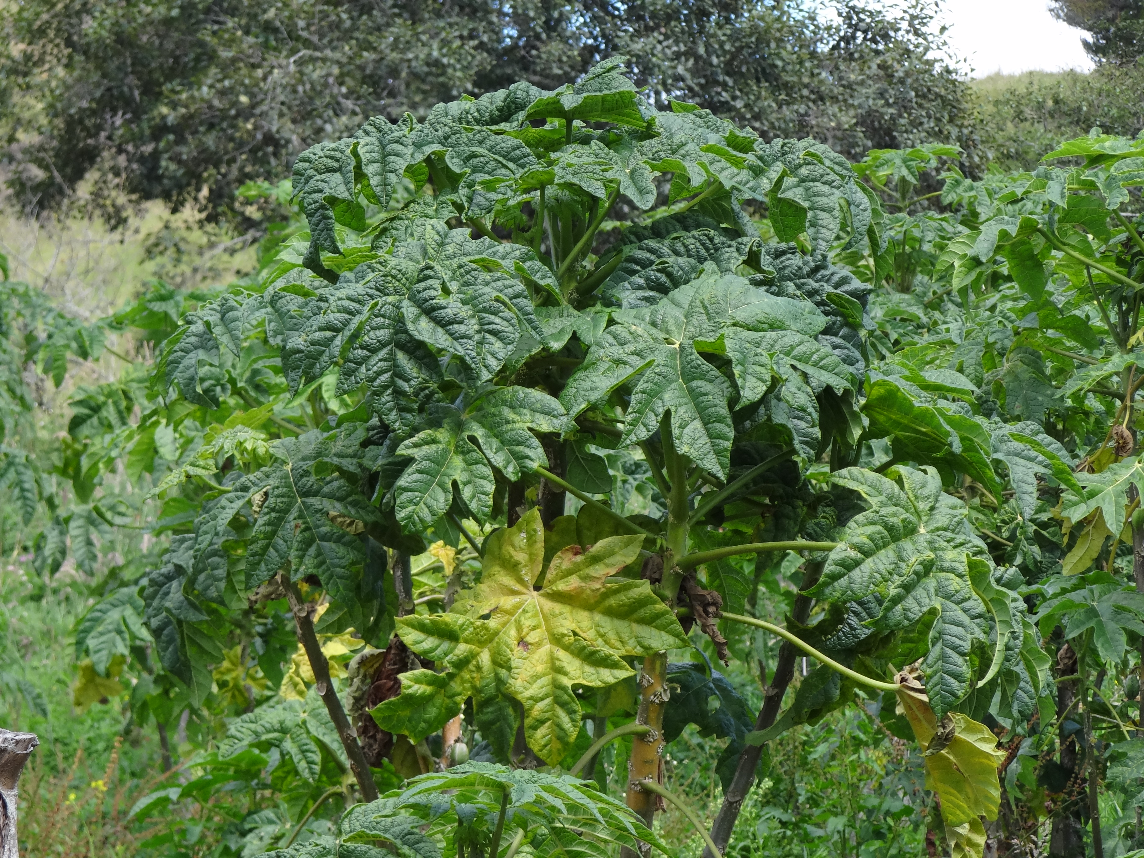 Planta de papayuelo (Carica pubescens)